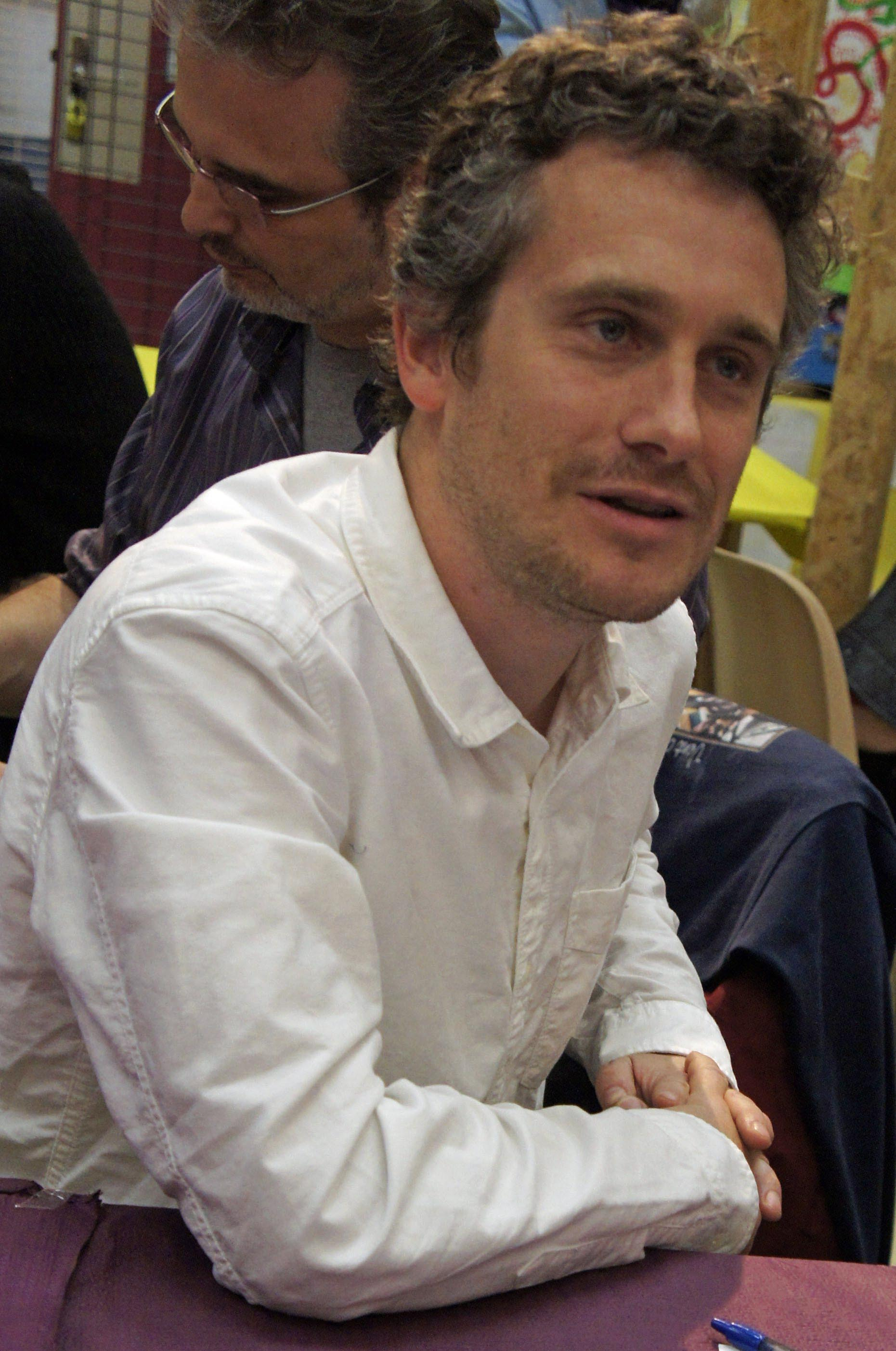 Fabrice_Colin au salon du livre de jeunesse de Cormontreuil.